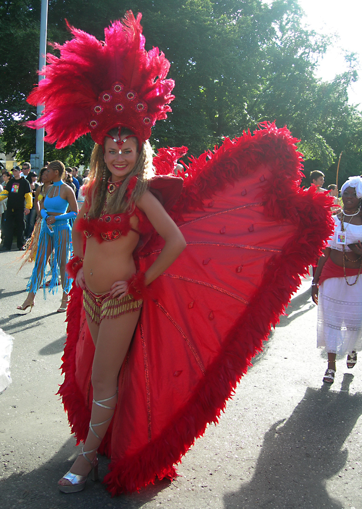 Samba dancer.